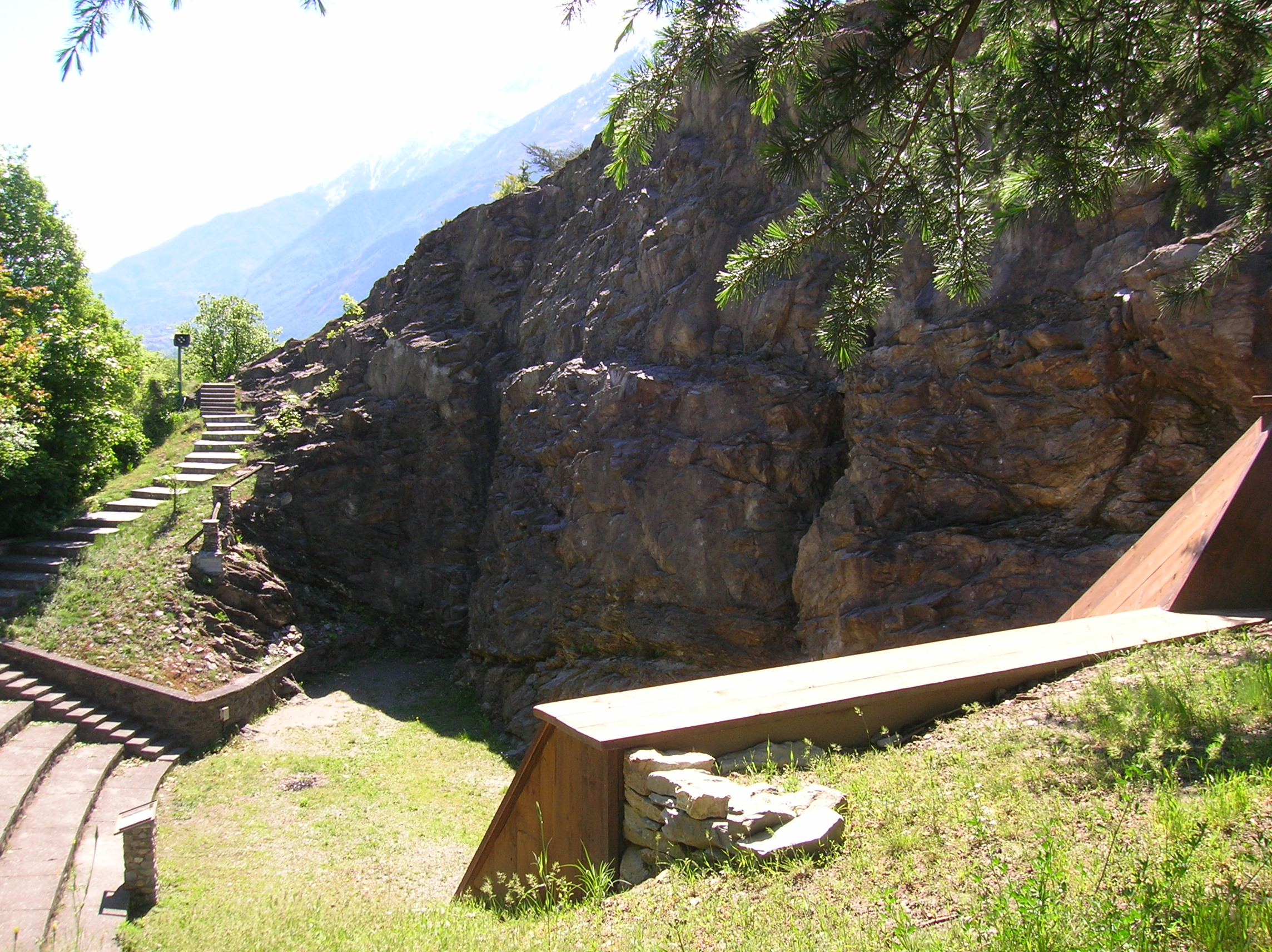 Rocciodromo (palestra di roccia) del Castello Jocteau, Aosta, Valle d'Aosta, Italia. Il castello di solito non è visitabile: apertura straordinaria in occasione delle Caserme aperte al pubblico per il 151° anniversario dell'Esercito italiano.